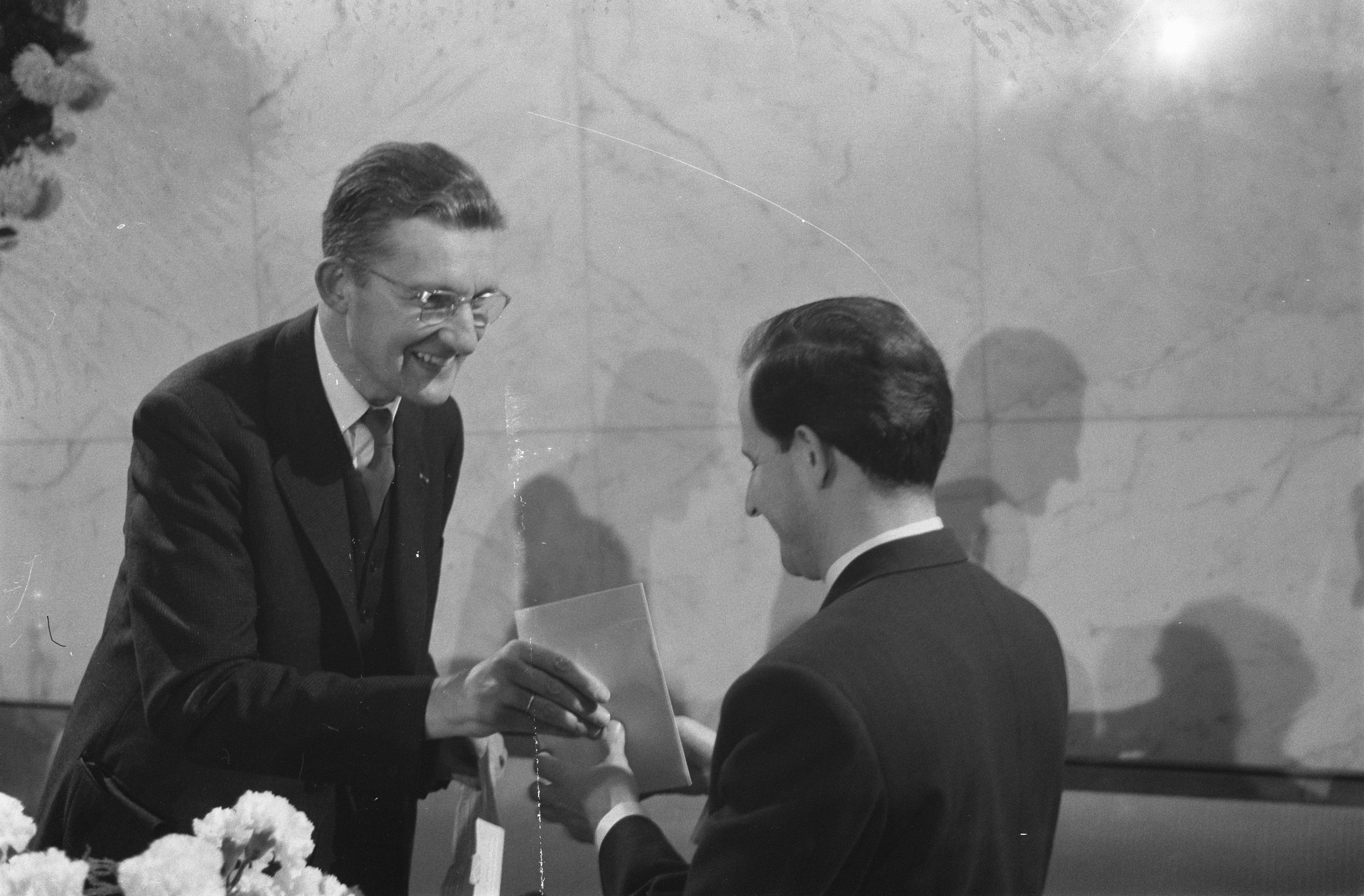 Collectie / Archief : Fotocollectie Anefo Reportage / Serie : [ onbekend ] Beschrijving : Uitreiking televisieprijs van Prins Bernhardfonds aan Milo Anstadt, prof. Wiarda reikt de prijs uit aan Milo Anstadt Datum : 6 oktober 1960 Trefwoorden : televisieprijzen, uitreikingen Persoonsnaam : Anstadt, Milo, Wiarda, [...] Instellingsnaam : Prins Bernhard Fonds Fotograaf : Pot, Harry / Anefo, [onbekend] Auteursrechthebbende : Nationaal Archief Materiaalsoort : Negatief (zwart/wit) Nummer archiefinventaris : bekijk toegang 2.24.01.05 Bestanddeelnummer : 911-6535